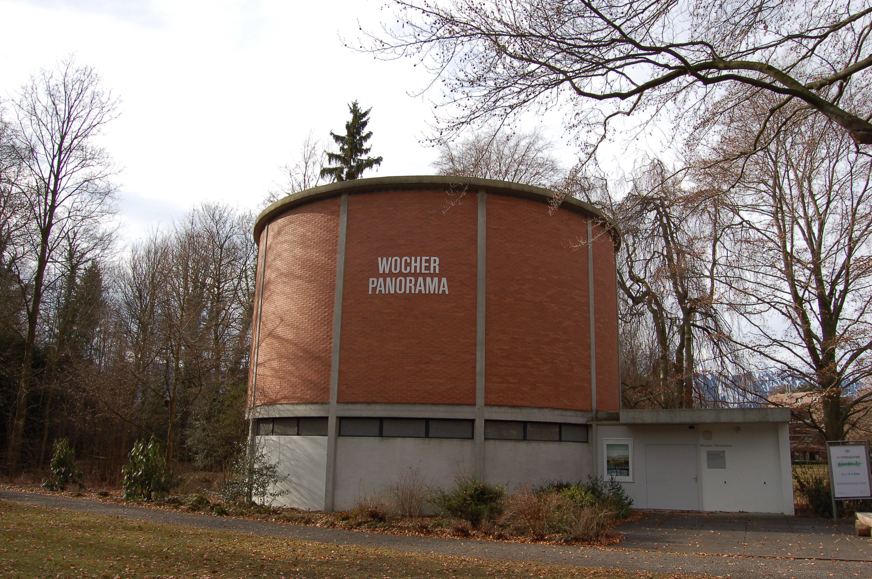 Wocher-Panorama in Thun